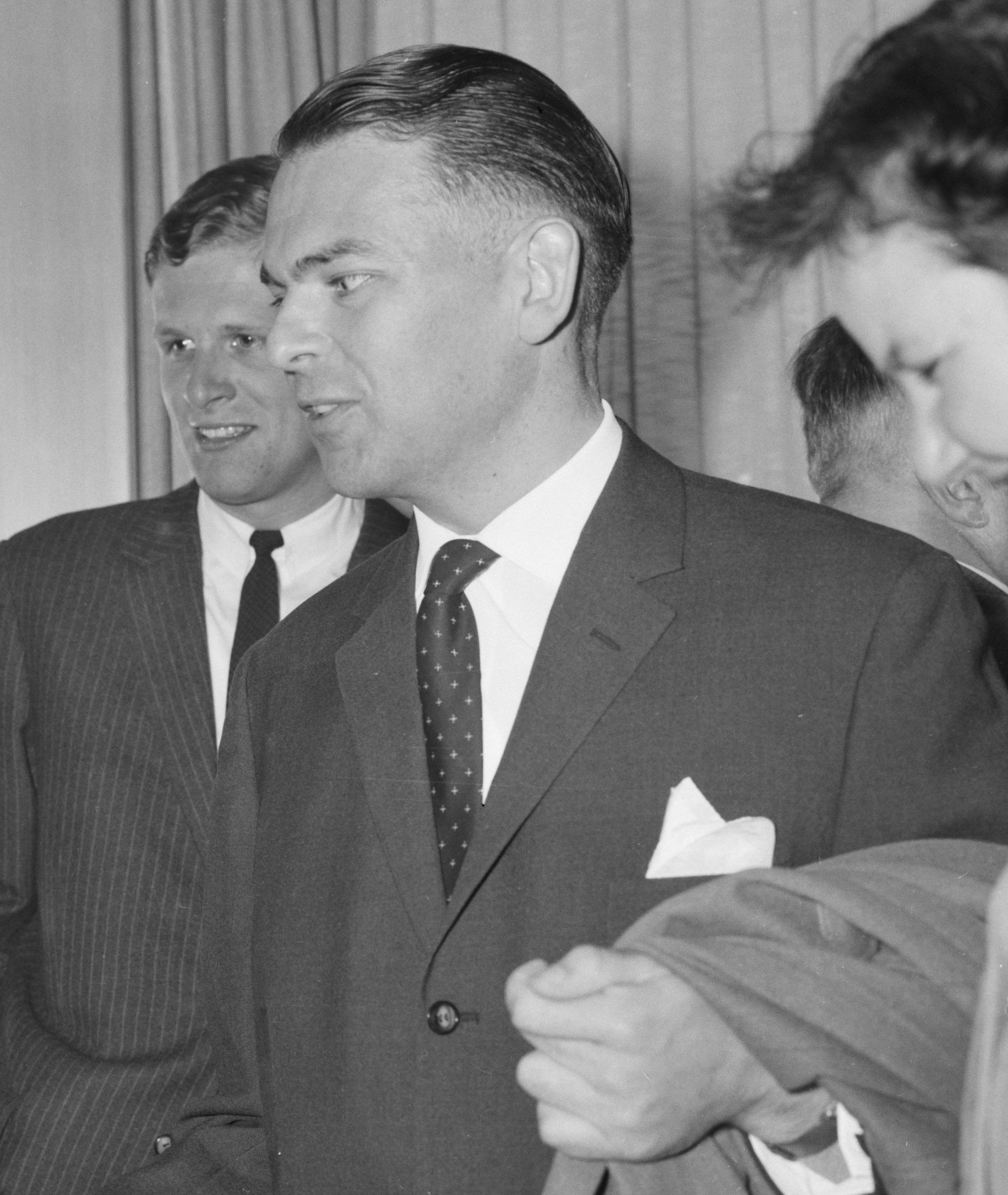 Collectie / Archief : Fotocollectie Anefo Reportage / Serie : [ onbekend ] Beschrijving : Vertrek 10 burgemeesters naar Amerika. Burgemeester Q. Waverijn van Koudekerk aan den Rijn Datum : 12 juni 1961 Trefwoorden : burgemeesters, delegaties Persoonsnaam : Waverijn, Q. Fotograaf : Bilsen, Joop van / Anefo Auteursrechthebbende : Nationaal Archief Materiaalsoort : Negatief (zwart/wit) Nummer archiefinventaris : bekijk toegang 2.24.01.04 Bestanddeelnummer : 912-5900 Reacties Geplaatst door Teun Waverijn op 21 december 2008 - 23:04. De heer in kwestie is mijn opa, zijn volledige naam luidt Quinten Waverijn.